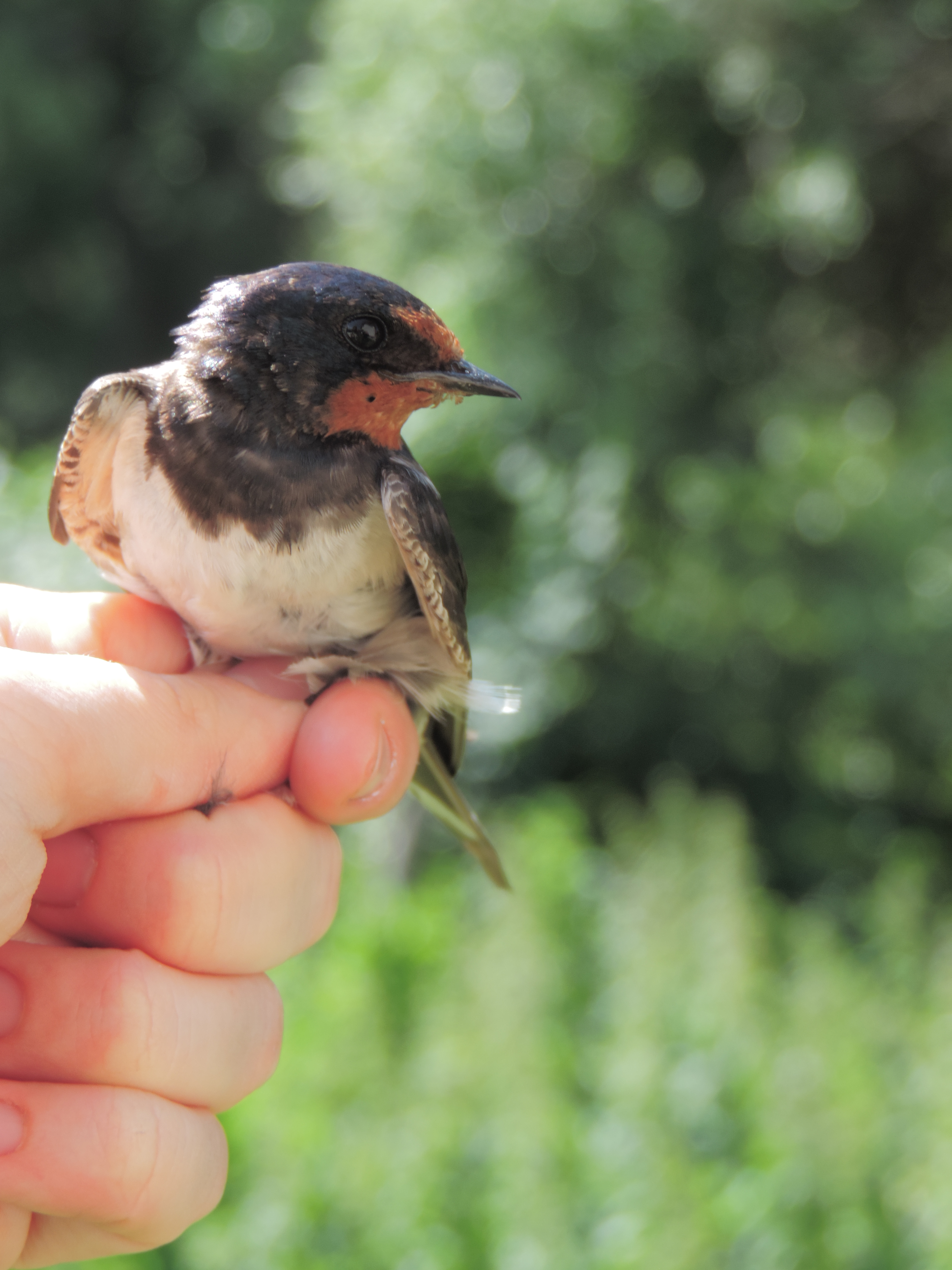 Prise à Ócsa, Hongrie